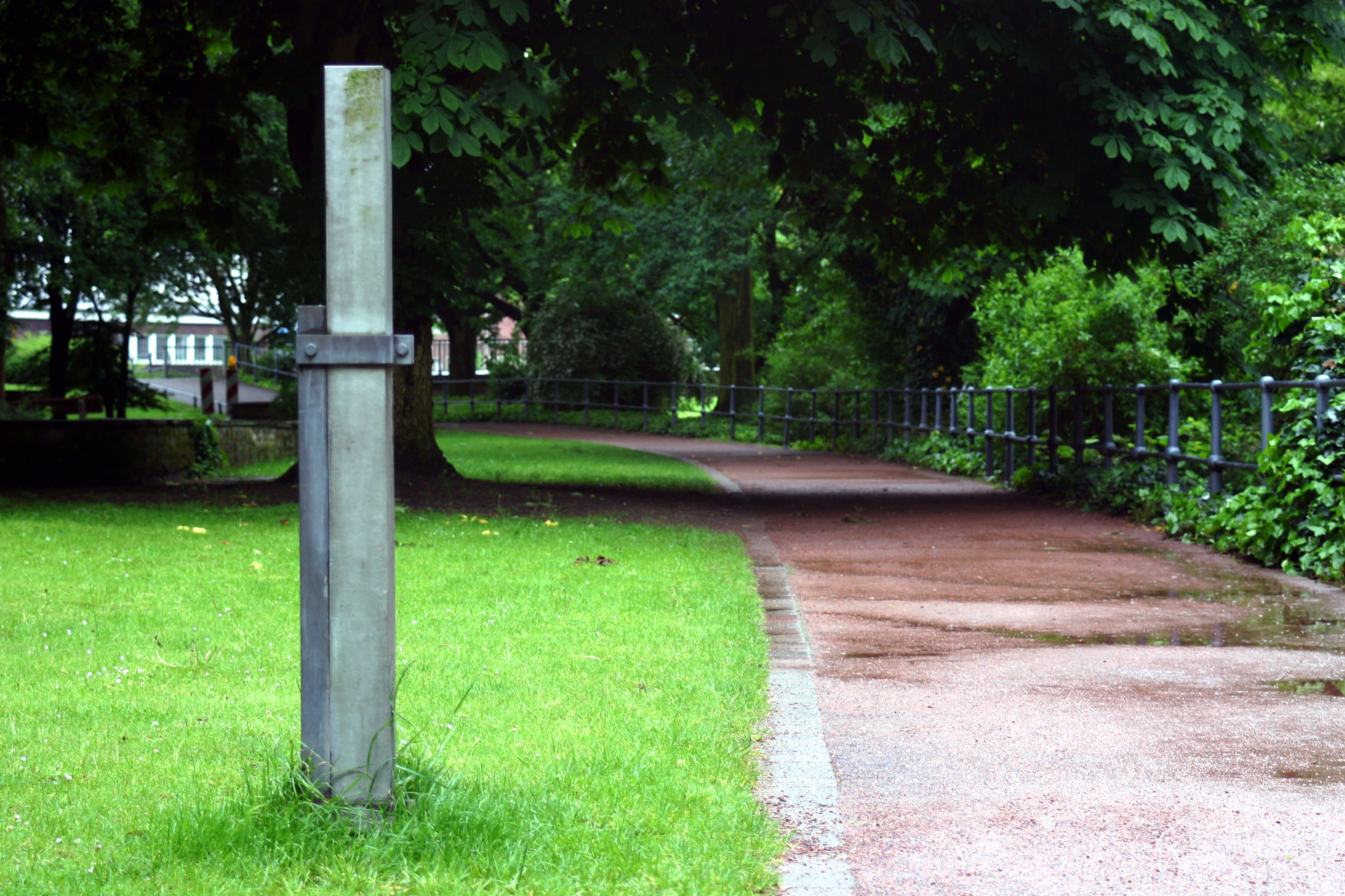 Giovanno Anselmo: Verkürzter Himmel 1987 - Staandort Aapromenade, Kath.-Theol. Fakultät